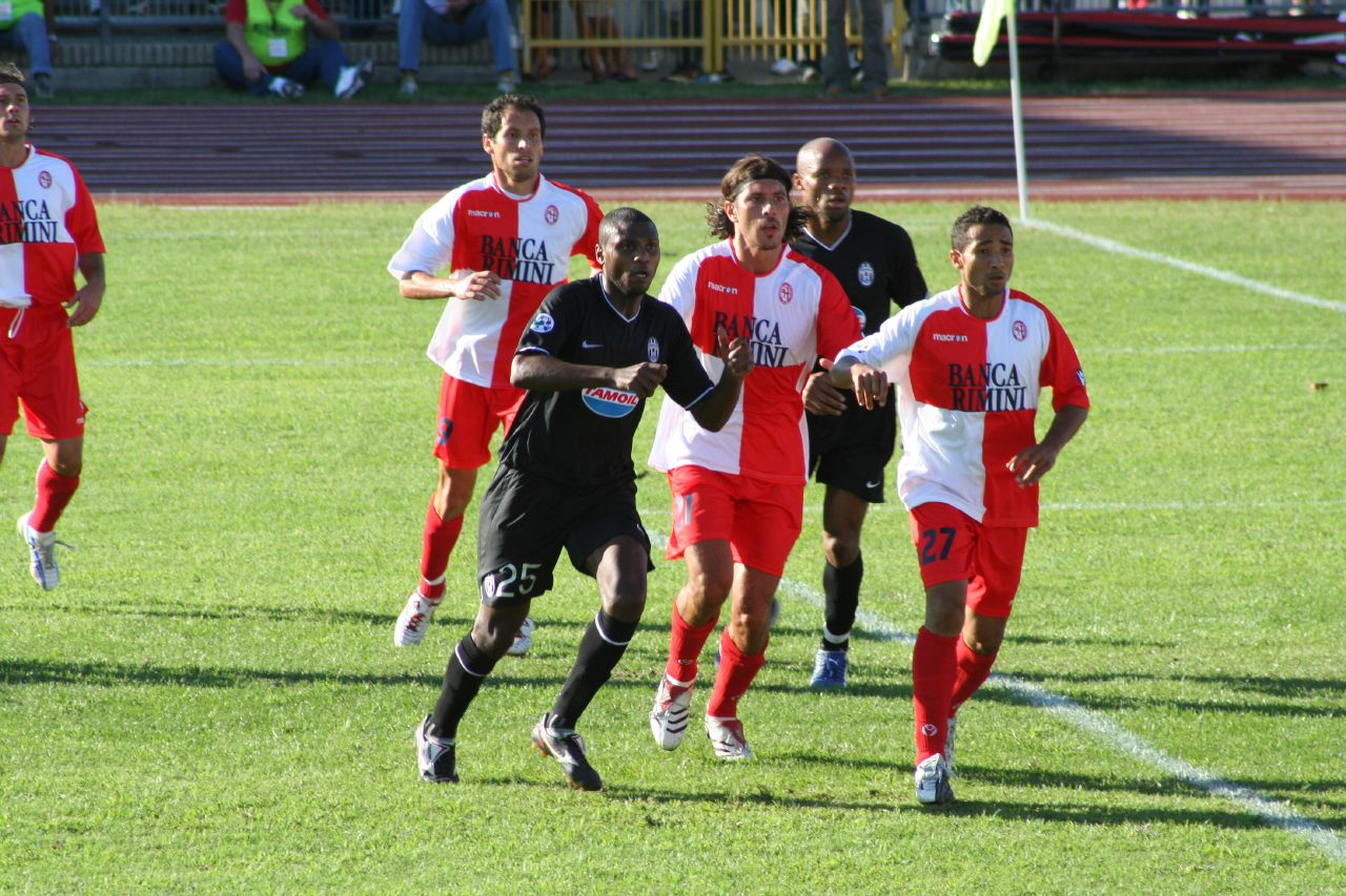 rimini-juventus, prima giornata di serie b 2006/07.